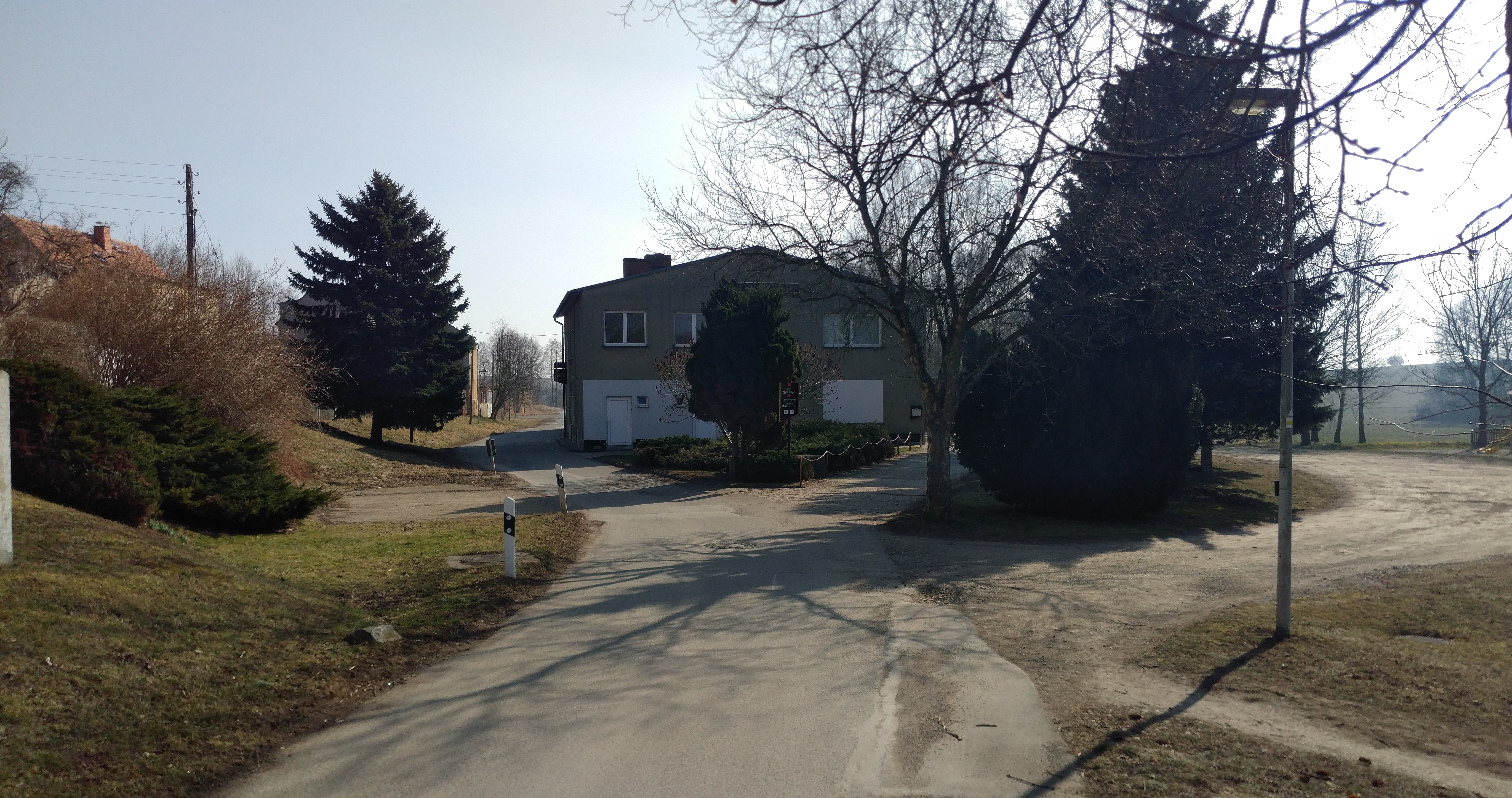 Kulturhaus „Alter Bahnhof“, Söllmnitz, Thüringen.